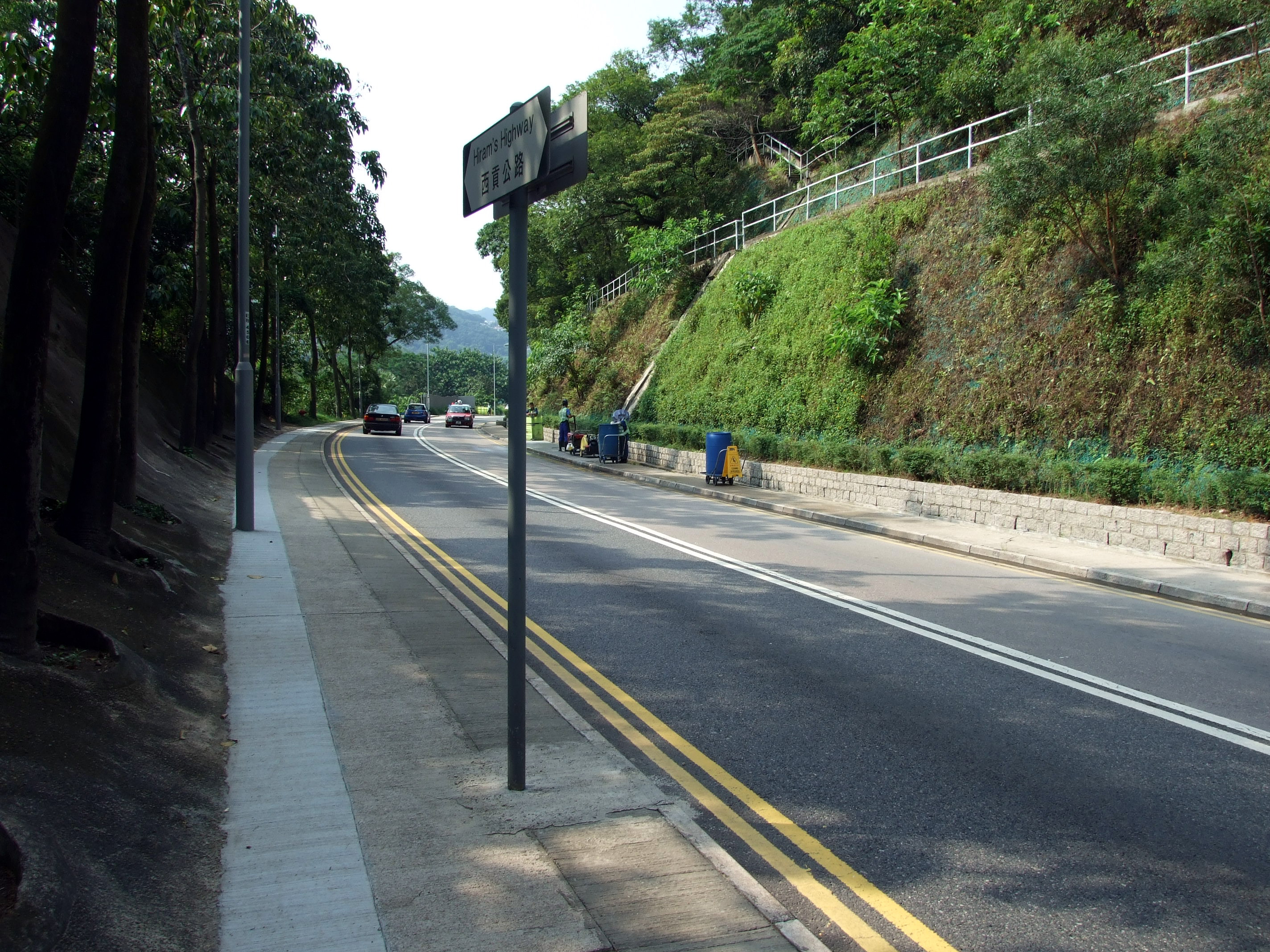 中文（香港）: 西貢公路近大涌口